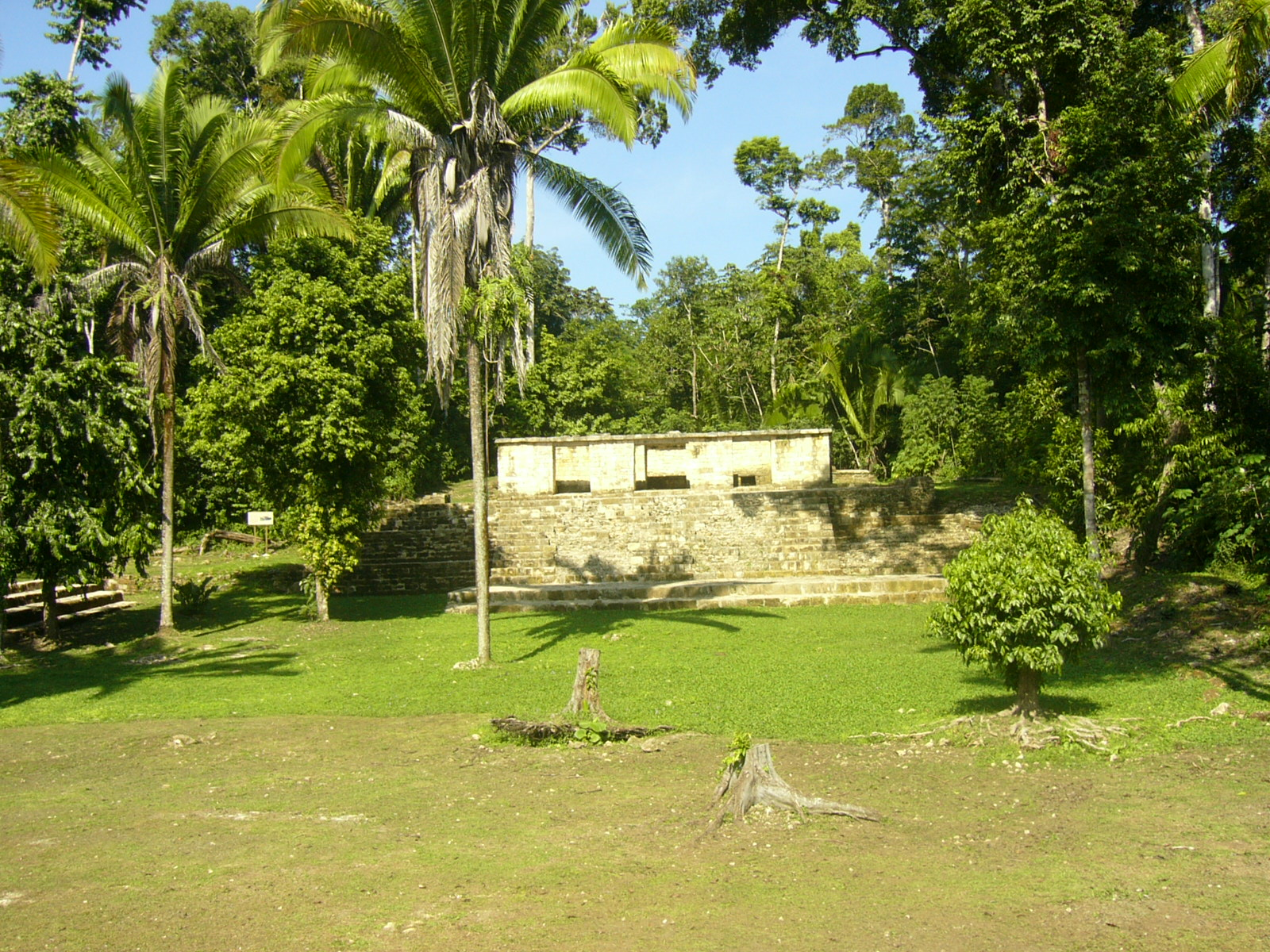 Aguateca temple seigneur 18.10.2006